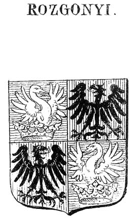 Blason de la famille hongroise Rozgonyi